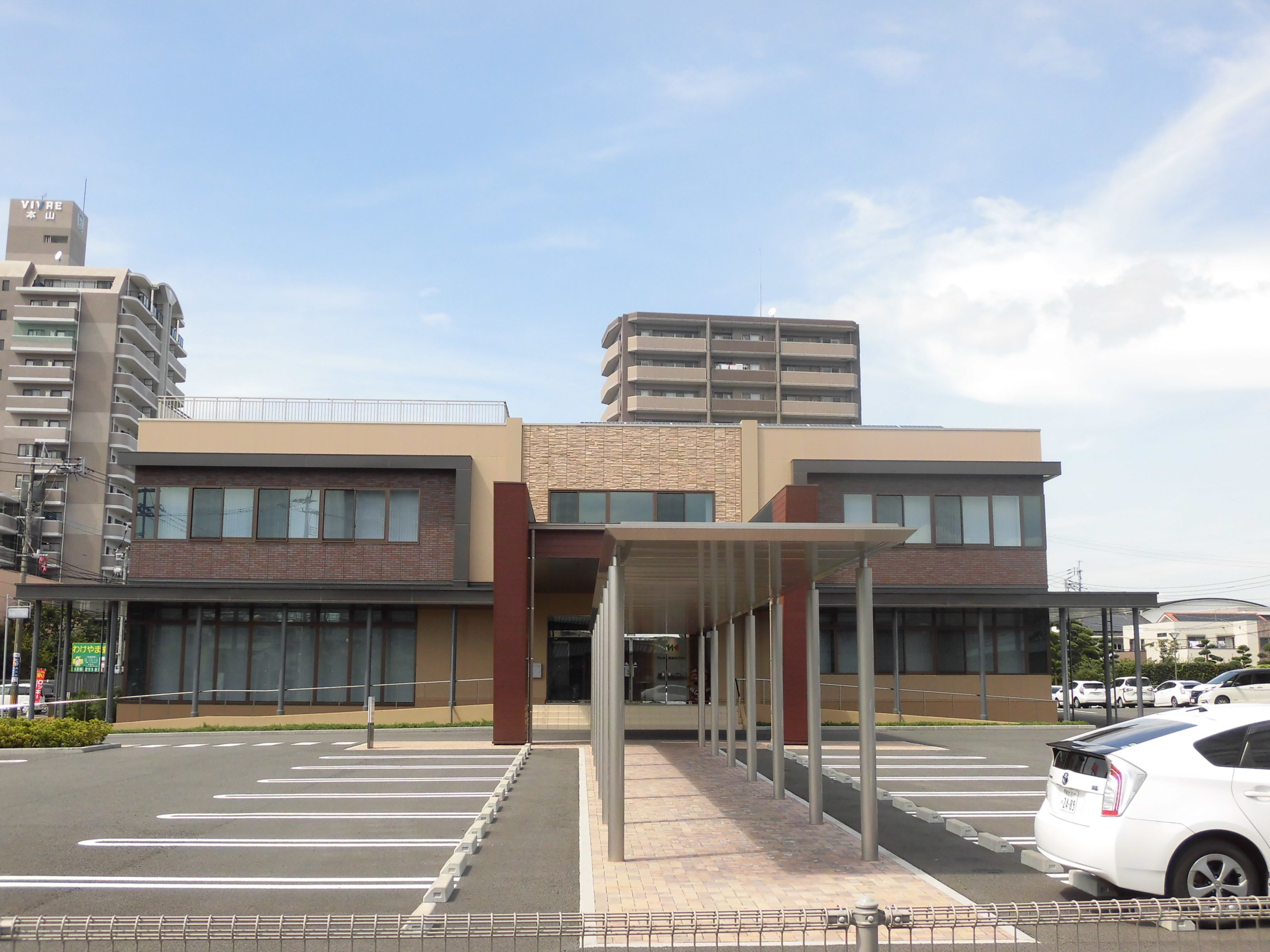 熊本市中央区にあるマルキン食品